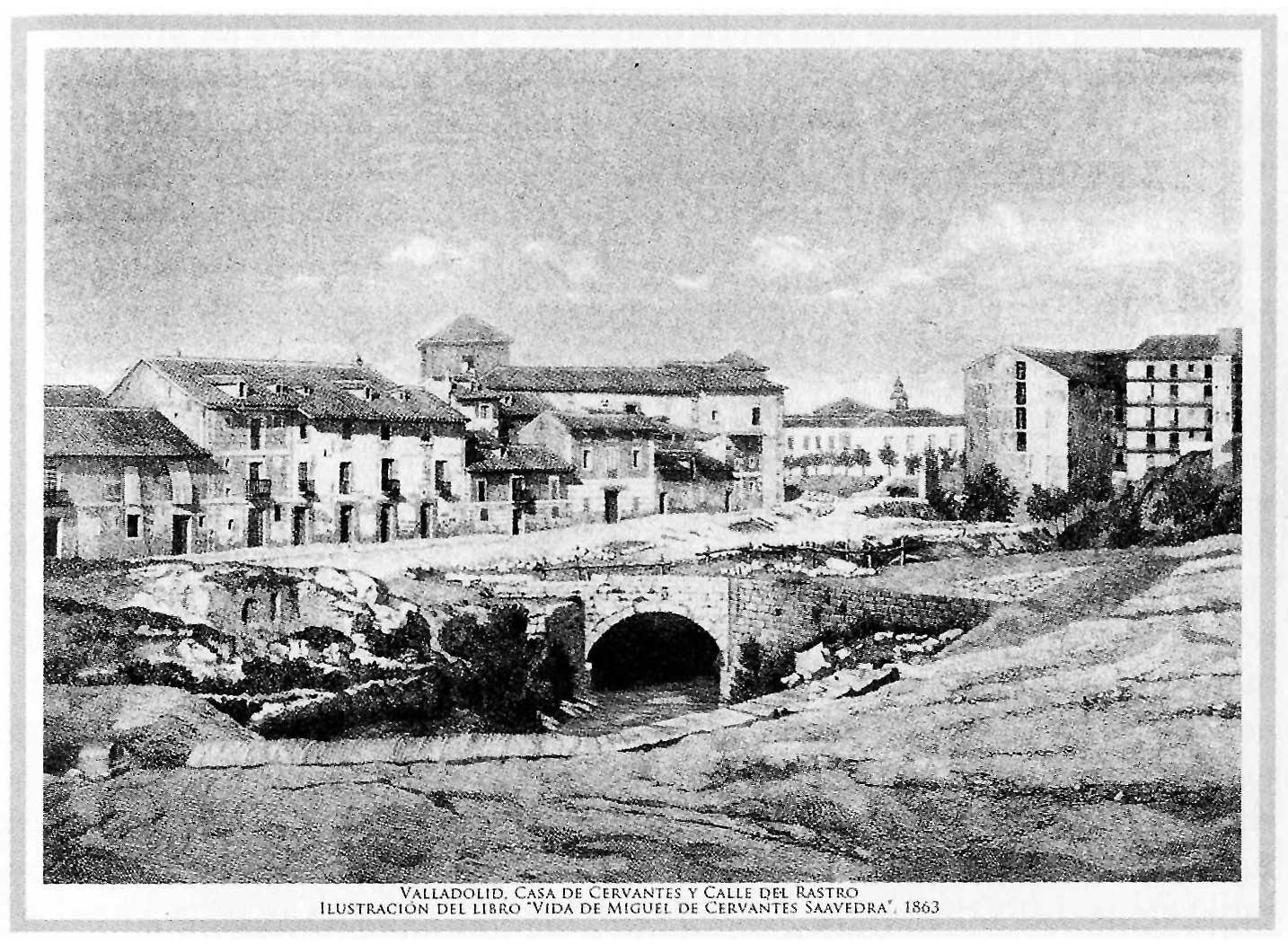 Puente sobre el río Esgueva, casas de Cervantes y a continuación lo último el edificio del desaparecido Hospital de la Resurrección. Todo en al ciudad de Valladolid, España. La imagen se encuentra ilustrando el libro Vida de Miguel de Cervantes Saavedra de Jerónimo Morán (1863). Se puede consultar en la Biblioteca Nacional de España.